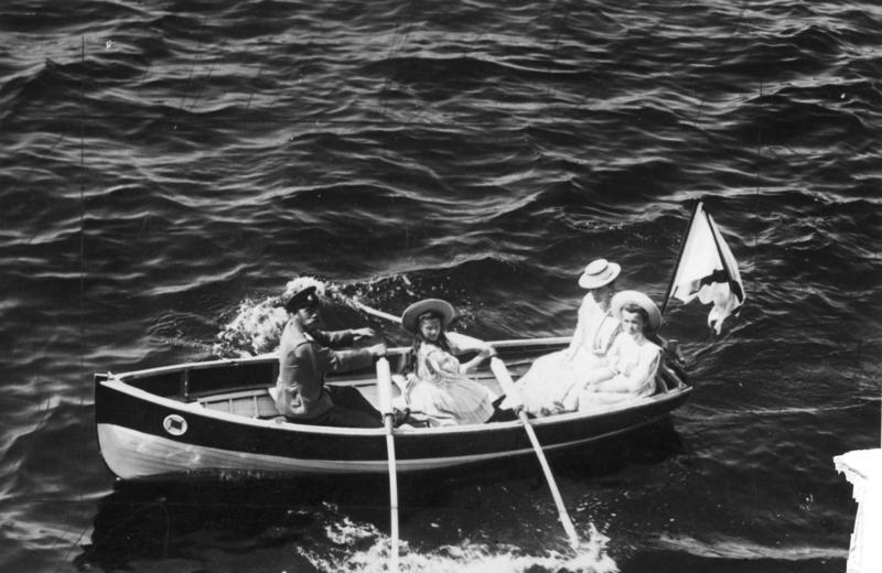 Russische Zarenfamilie bei Bootsausflug Scherl Bilderdienst 1909. Die russische Zarenfamilie in den finnischen Schären. Zar Nikolaus II., Zarin Alexandra Feodorowna, Grossfürstin Olga Nikolajewna und Grossfürstin Tatjana Nikolajewna. 3478-09 Abgebildete Personen: Nikolaus II.: Rußland, Zar, II., Russland